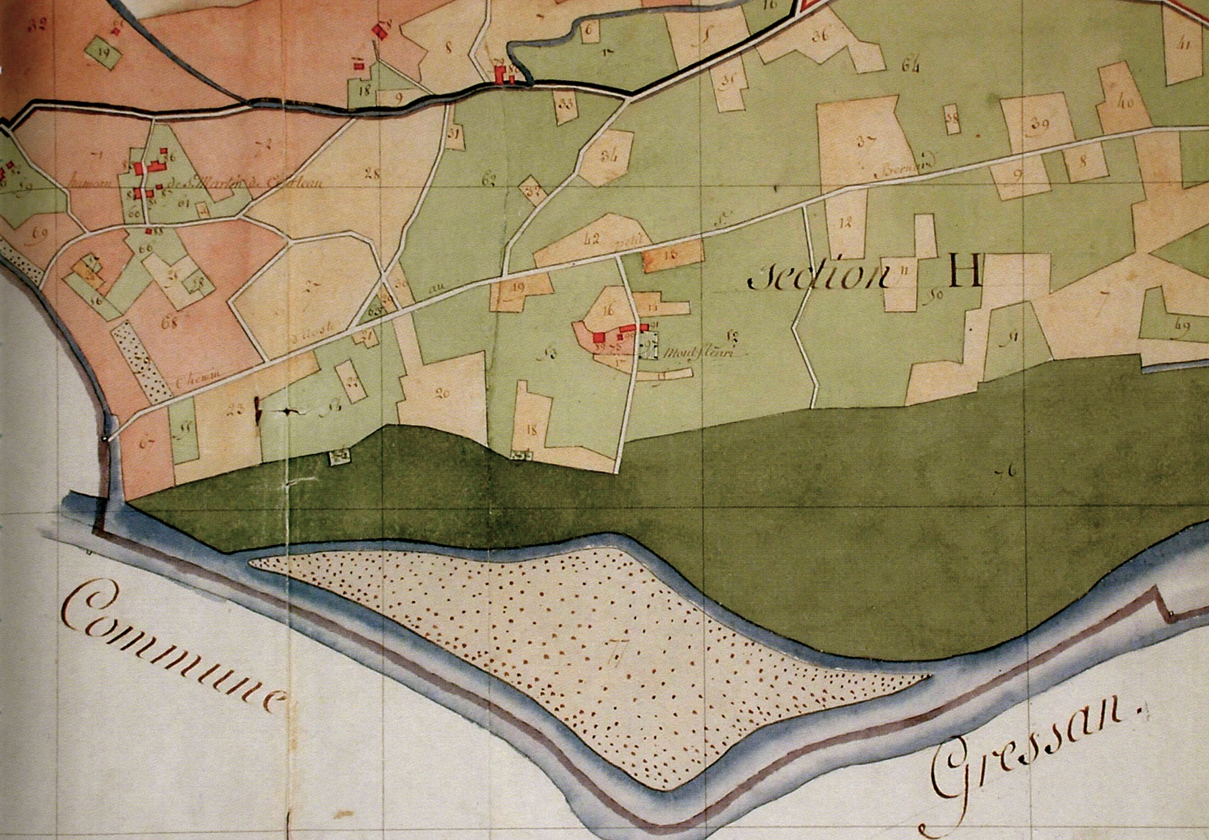 Particolare della mappa del Catasto Francese per masse di coltura del 1804, "Plan de la Comune d'Aoste, Départ. de la Doire, Arrondissement comunal d'Aoste, Canton D. Terminé le 25 Brumaire an 12 par le C.n Turno Géomètre en Chef et le C.n Margery Arpenteur". Castello di Montfleury, Aosta, Valle d'Aosta, Italia.